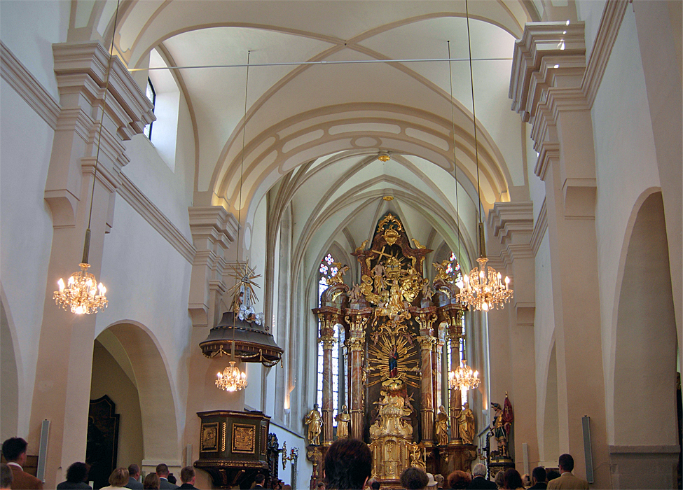 Pfarrkirche Grossenzersdorf, Innenraum